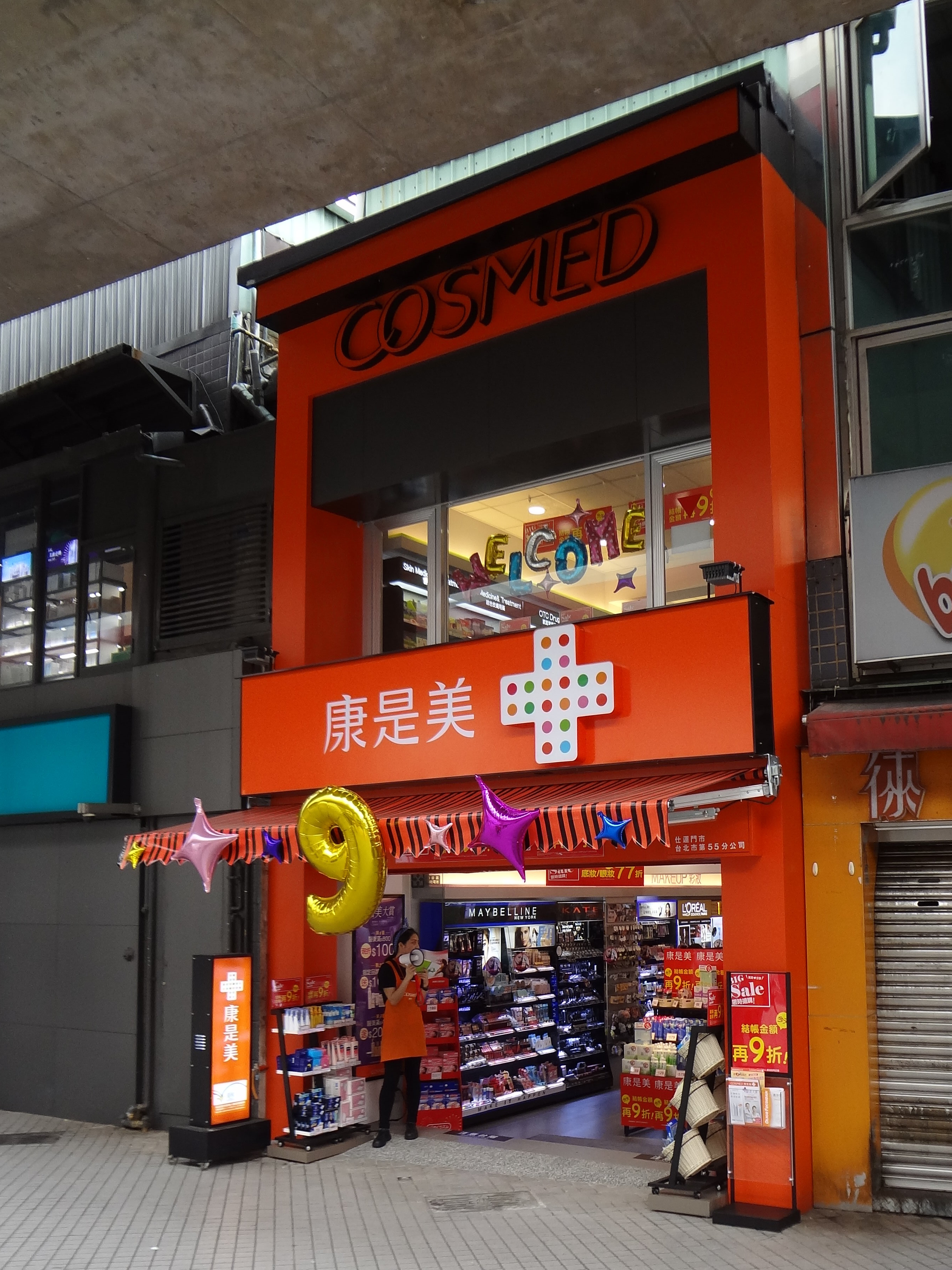 康是美仕運門市，地址：臺北市士林區中正路235巷2號。